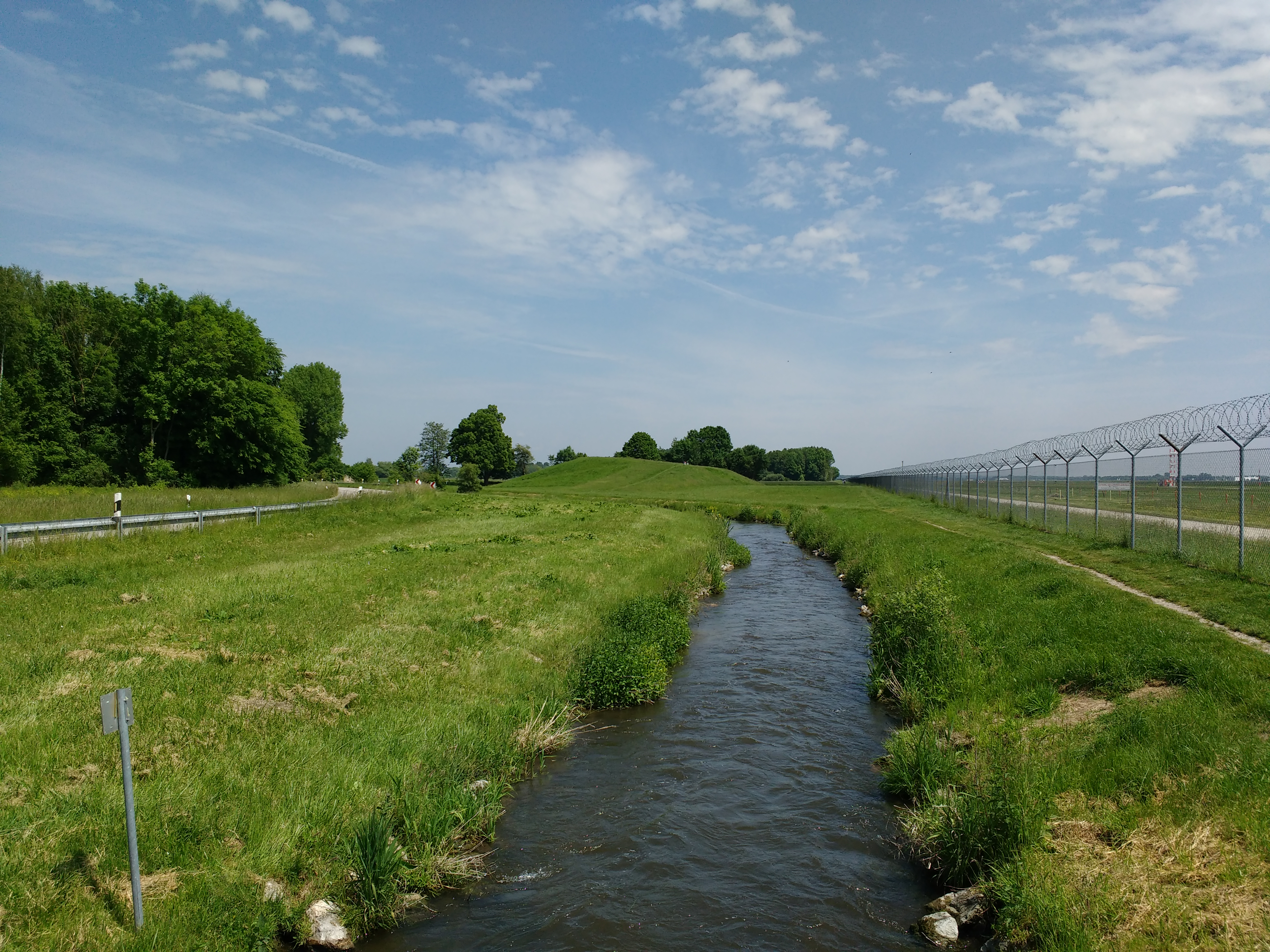 Goldach bei Attaching